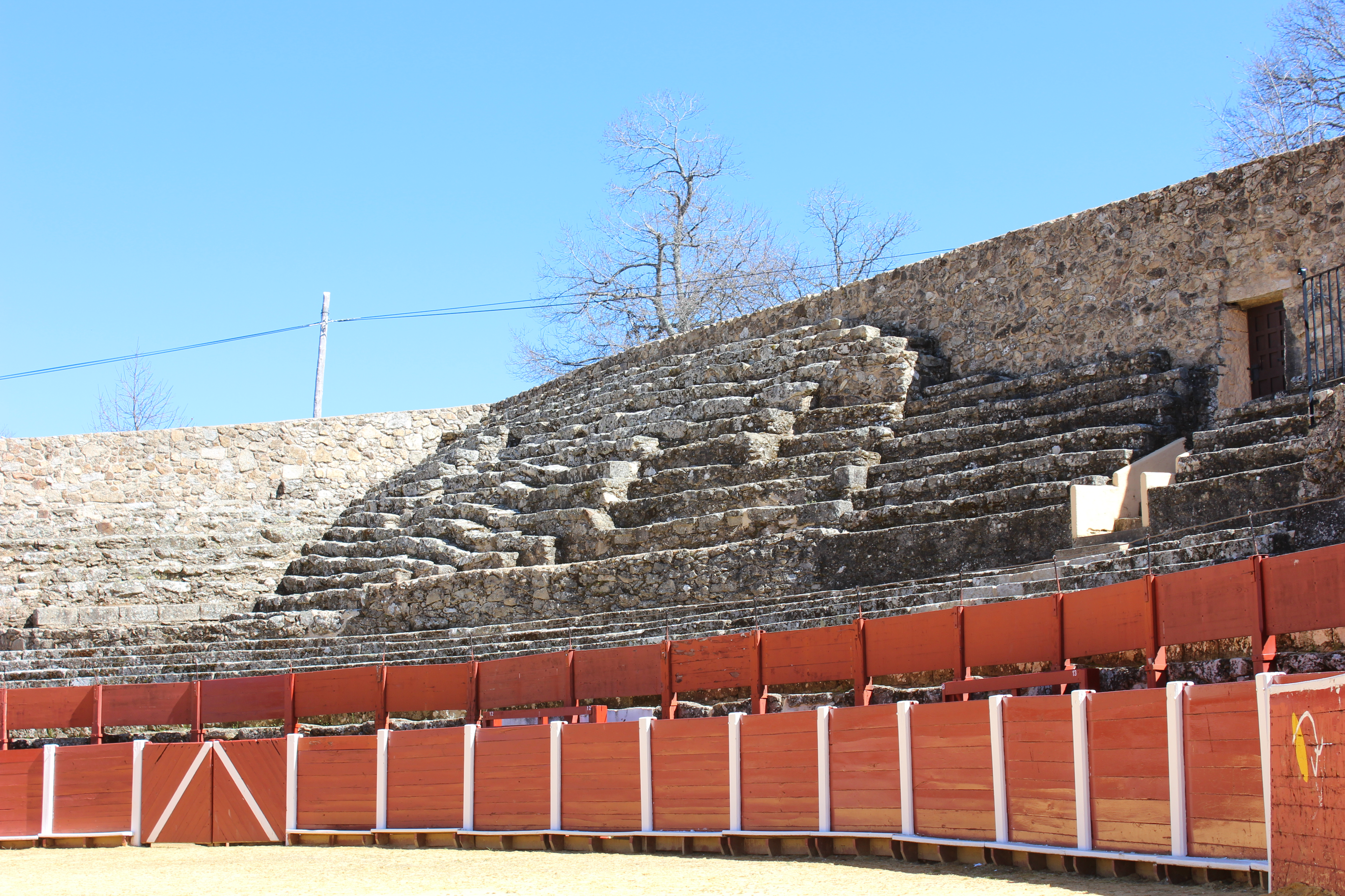 حلبة مصارعة الثيران في بيخار في مقاطعة سلامنكا الإسبانية.